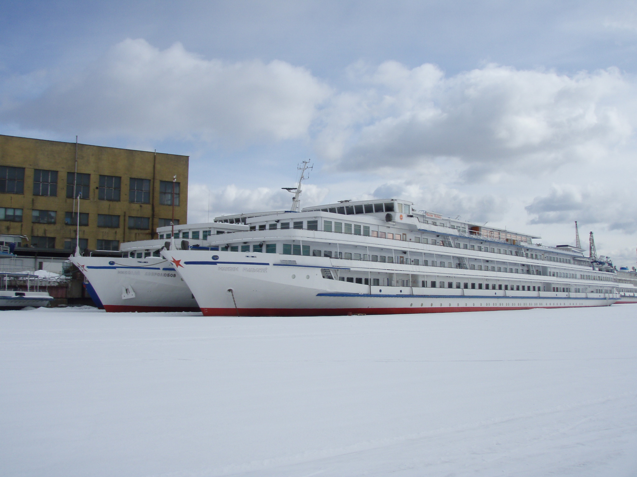 теплоход «Максим Рыльский» на зимней стоянке в Северном речном порту в Москве